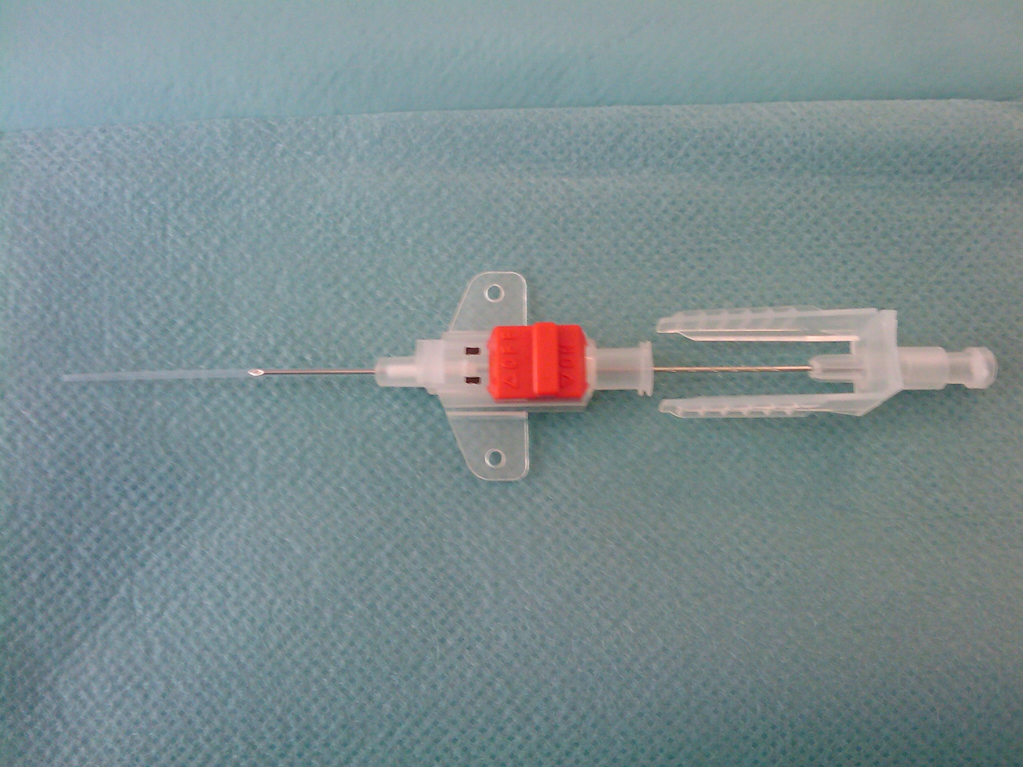 Arteriyal kateter (punksion)